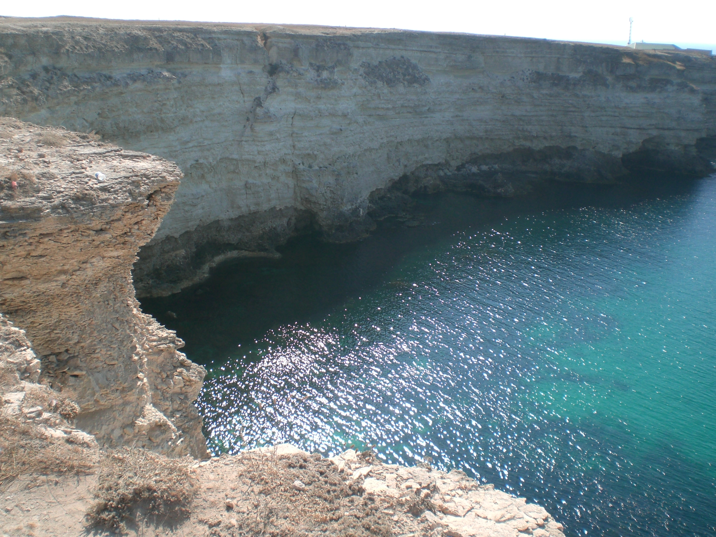 La rokoj de la kabo Tarĥankuto (la okcidenta parto de la Krimea duoninsulo, Ukrainio).